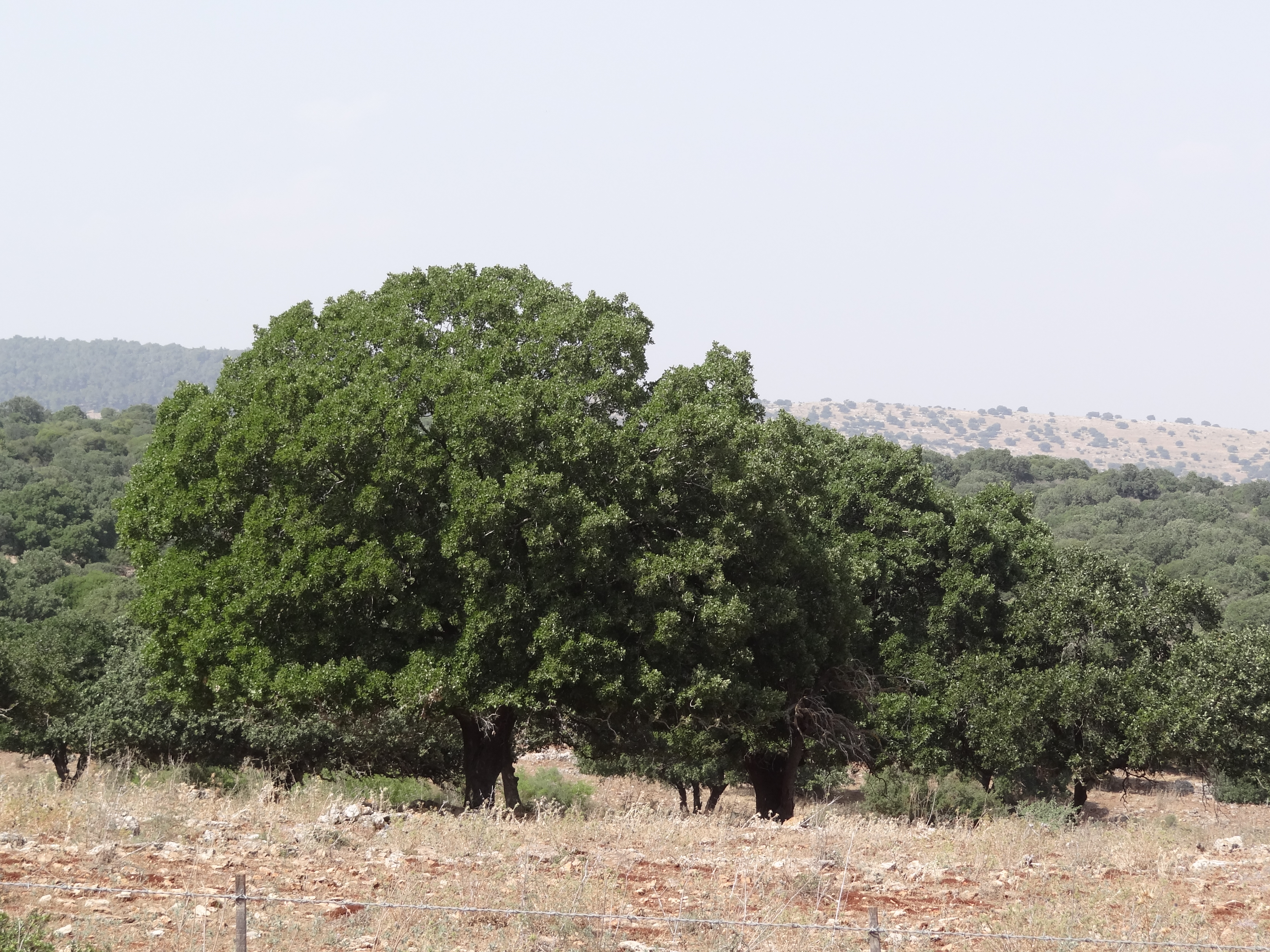 שמורת אלוני בית קשת היא שמורת טבע מוצעת של עצי אלון התבור המשתרעת על פני שטח של 5,054 דונם במורדות המזרחיים של הרי נצרת. ממערב מצפון ומדרום לקיבוץ בית קשת.